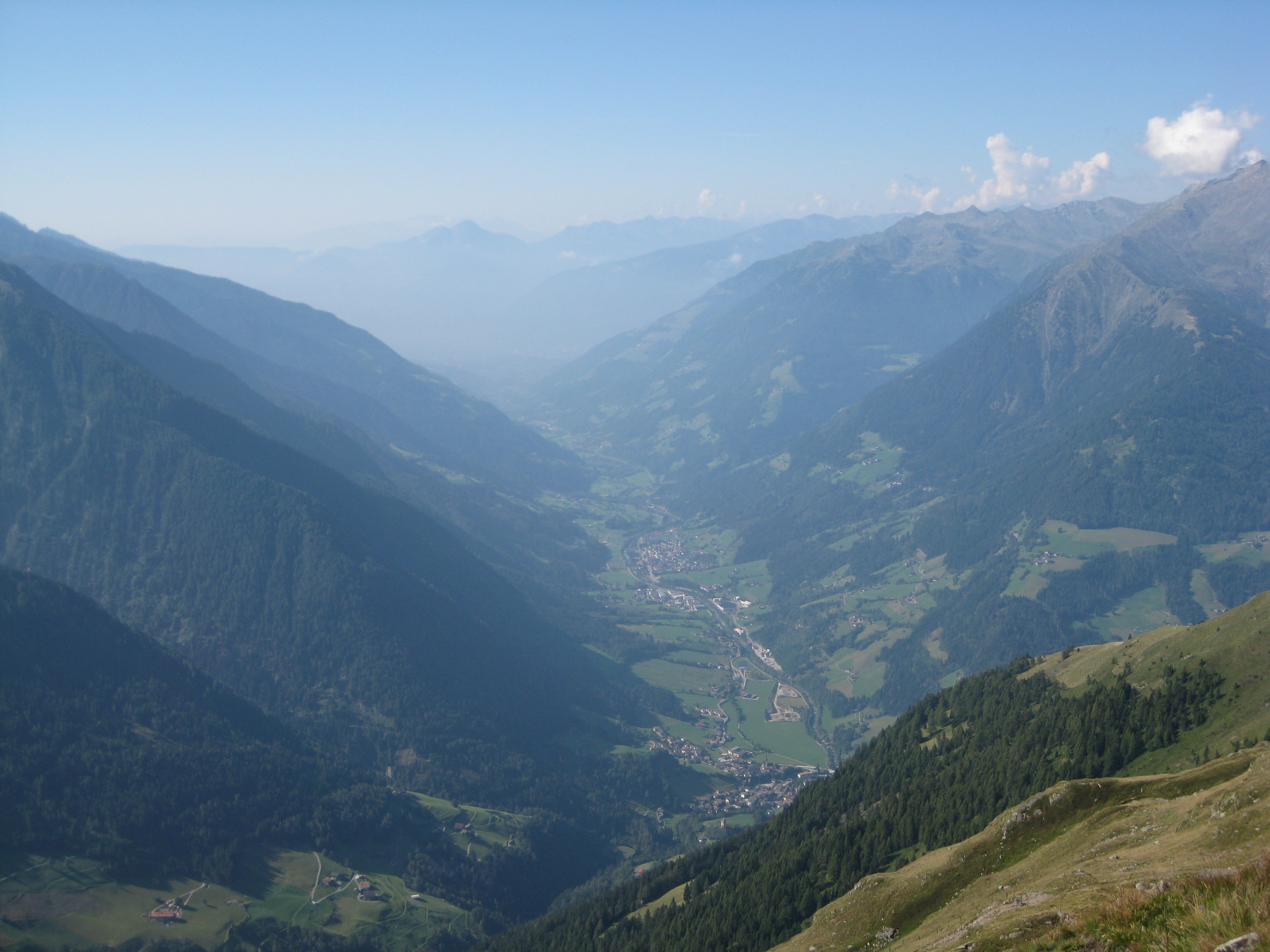 Passeier vom Jaufenkamm gesehen